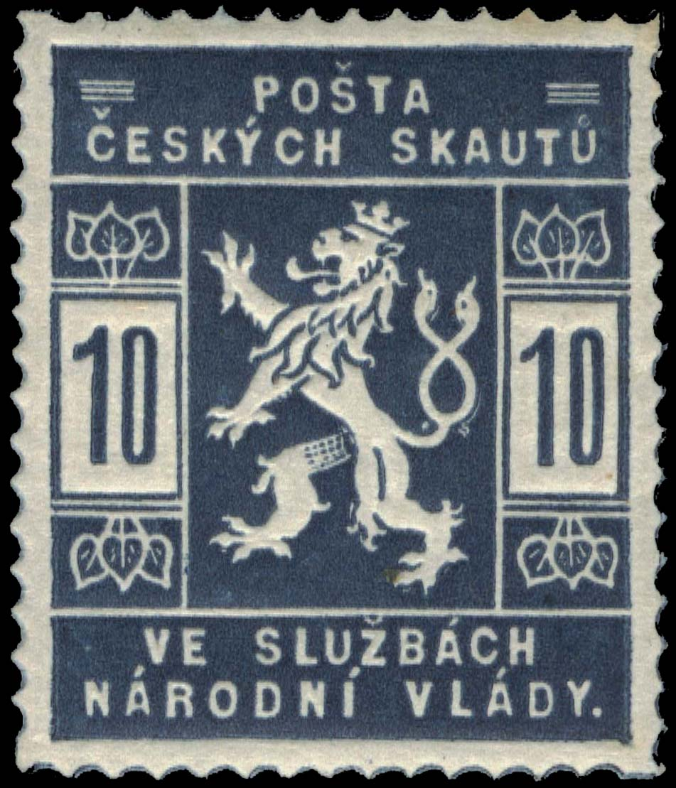 Почтовая марка скаутской почты в Праге